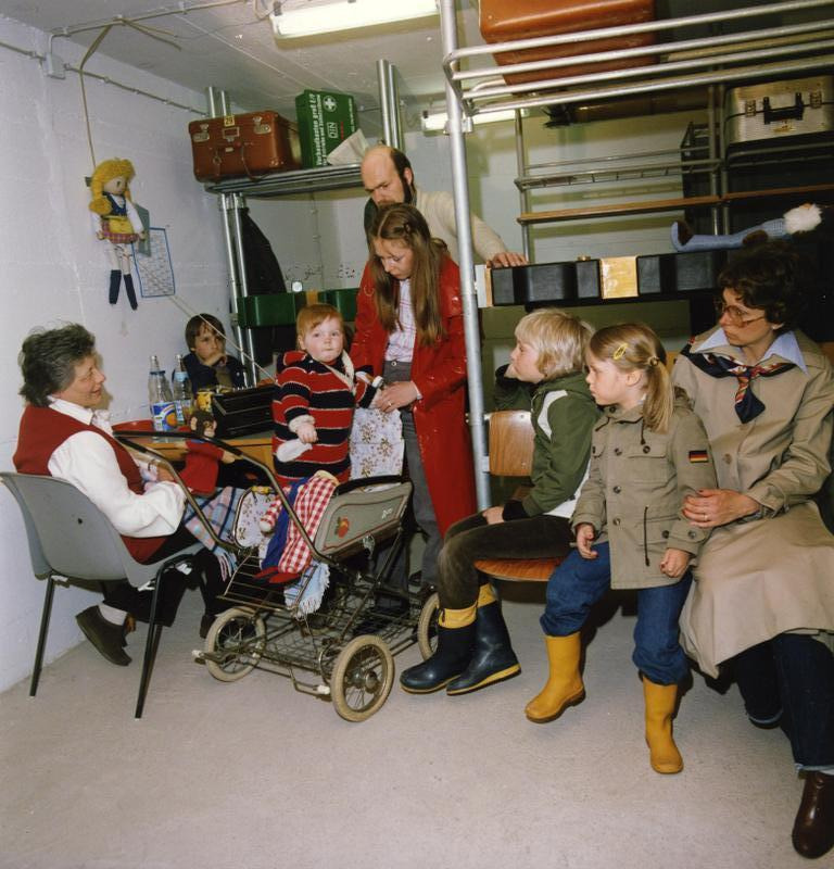 Zivilschutz, Schutzraumbelegung Schutzraum-Belegung [Zivilschutzübung (?), Belegung eines Schutzraums mit Frauen und Kindern]